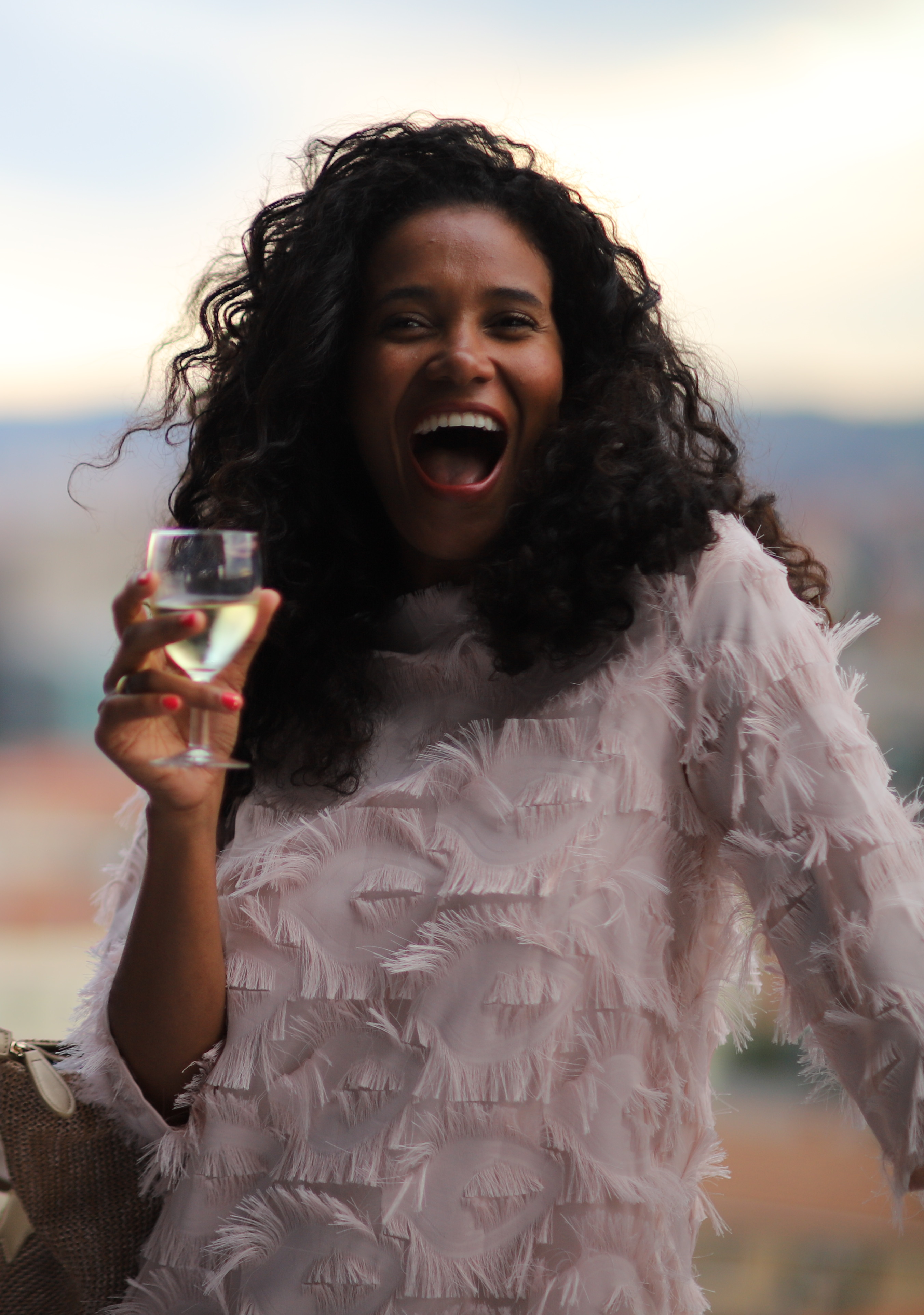 Open Day con aperitivo esclusivo in terrazza 27-28 giugno 2018 Bologna